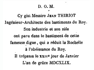 Sépulture de Jean Thiriot